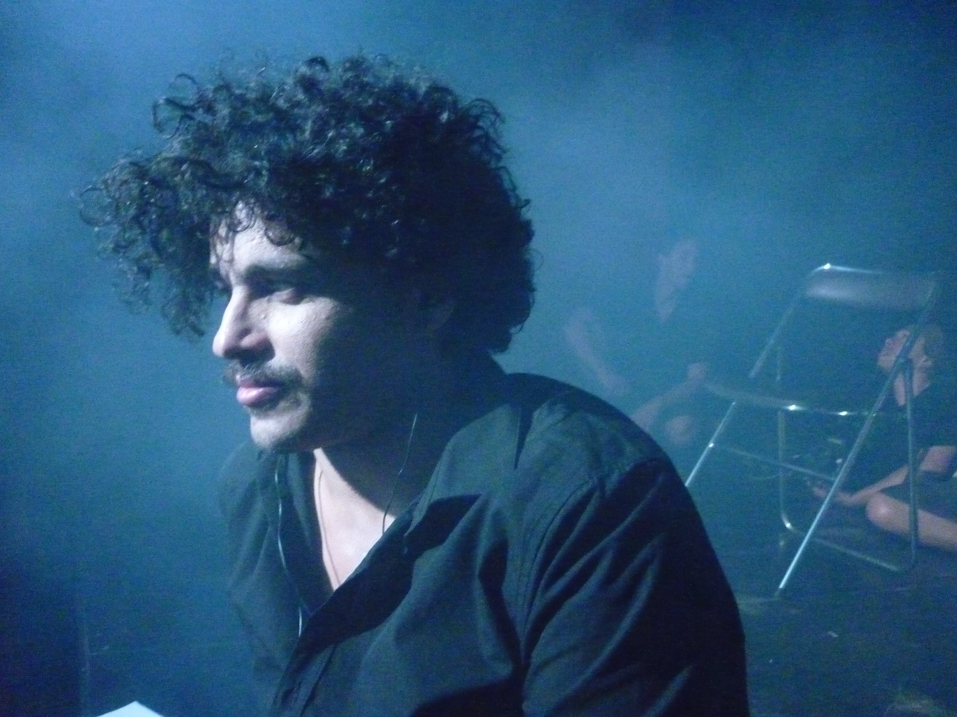 Parigi-2013 foto di scena